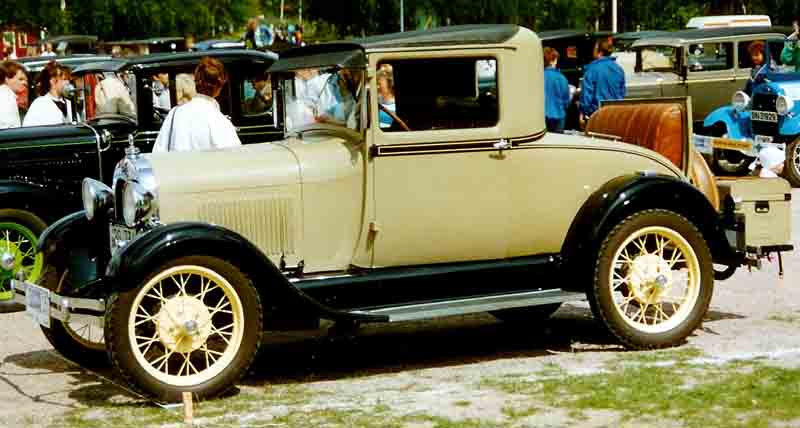 Ford Model A Special Coupé 1928